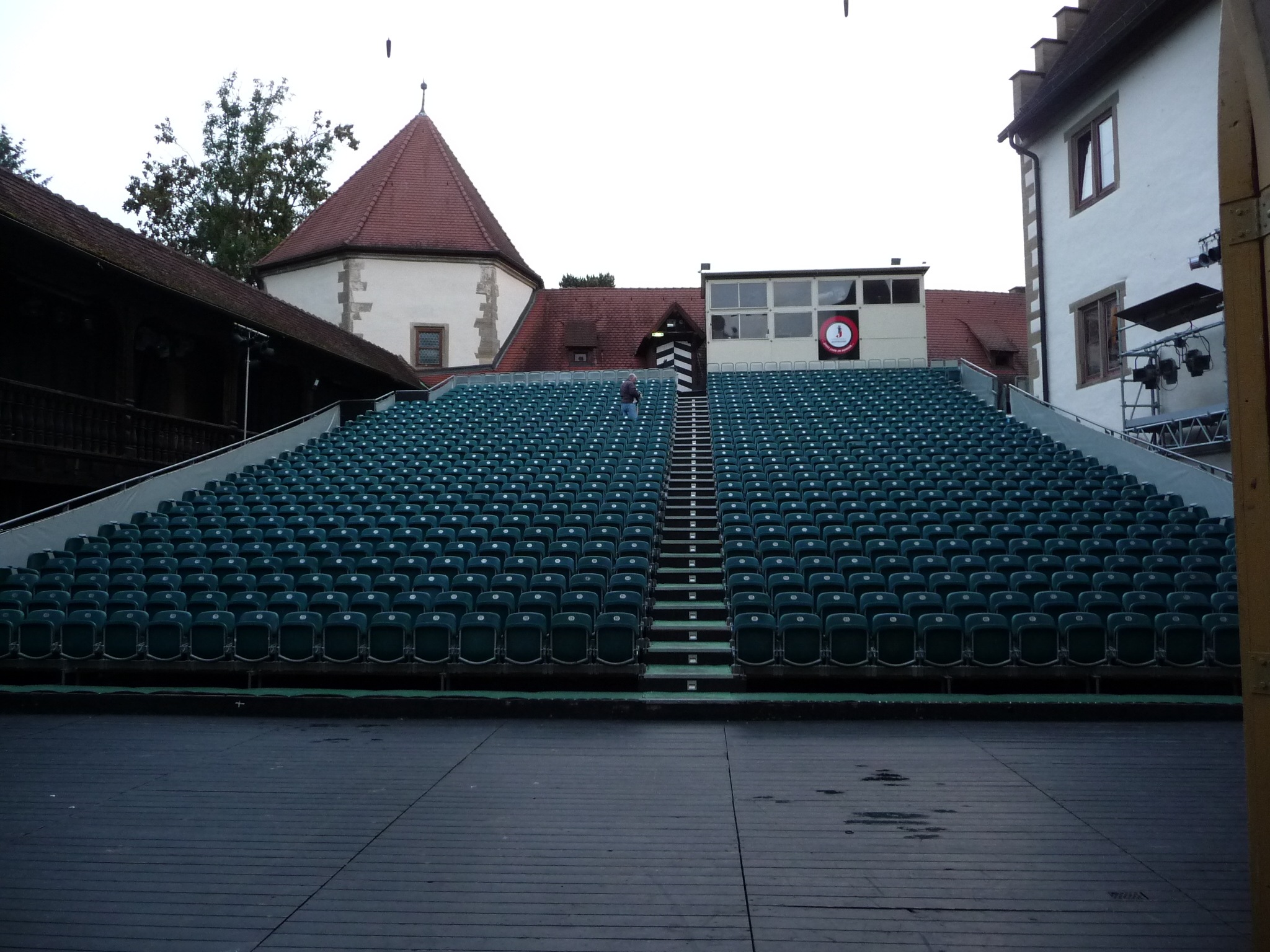 Jagsthausen ist eine Gemeinde mit 1500 Einwohnern im Landkreis Heilbronn im nördlichen Baden-Württemberg.